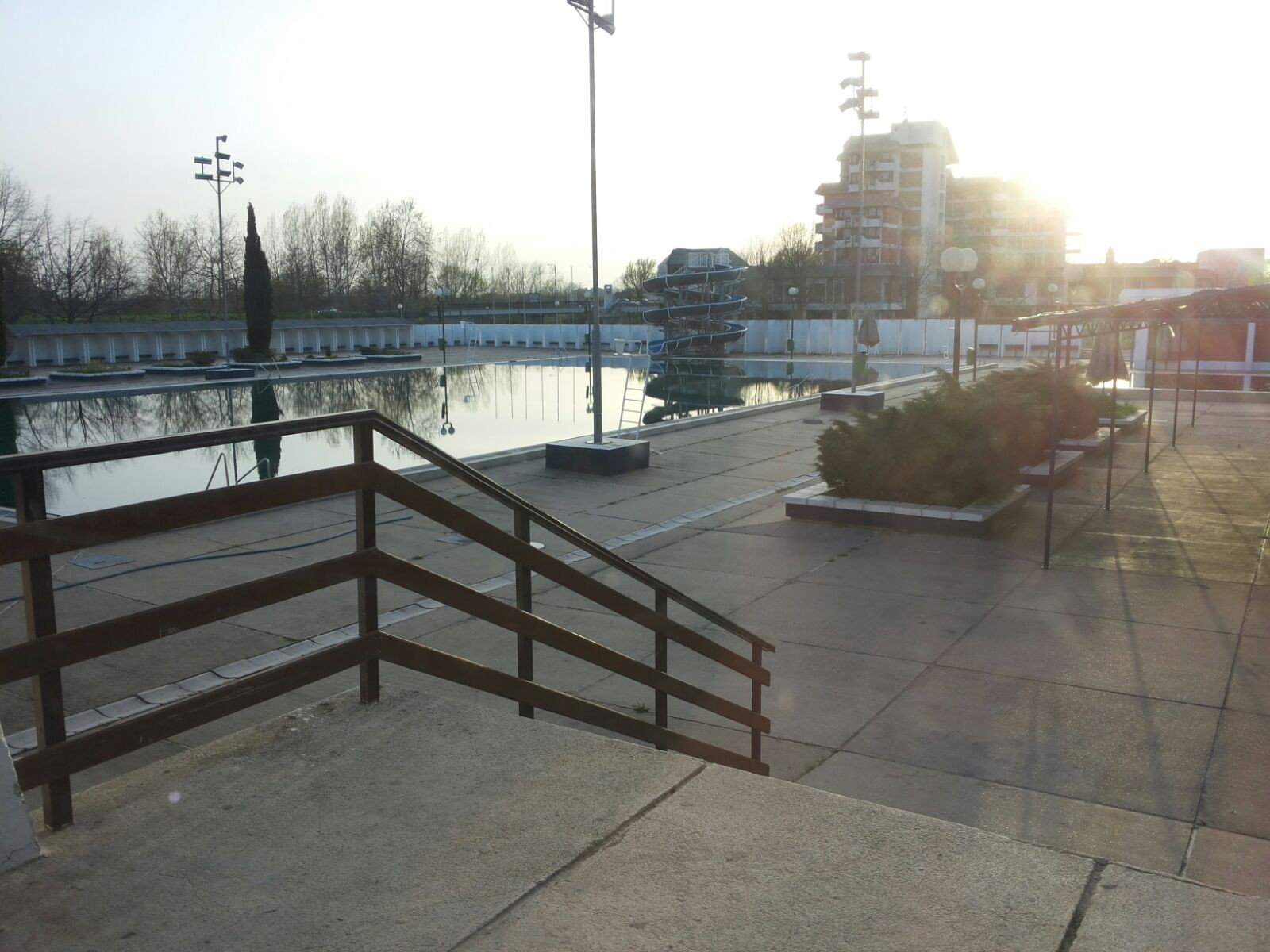 Bazeni sportskog centra Obrenovac